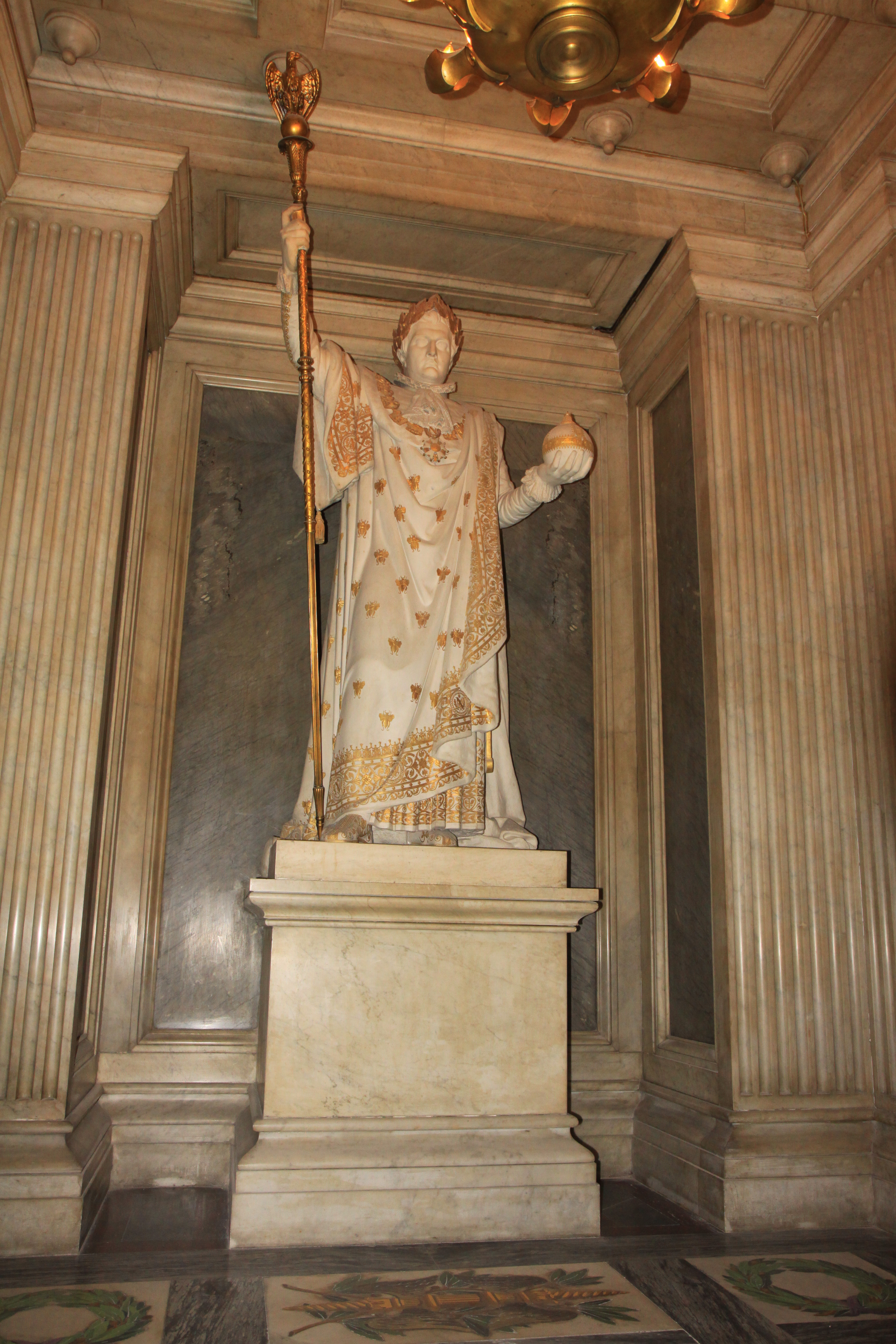 Pierre-Charles Simart (Français, 1806-1857): statue en pied de Napoléon Ier en grand habit de sacre, XIXe s., marbre, hauteur 260 cm, au-dessus du tombeau du Roi de Rome dans la cella de la crypte du Dôme des Invalides, Hôtel des Invalides, VIIe arrondissement, Paris, France. .